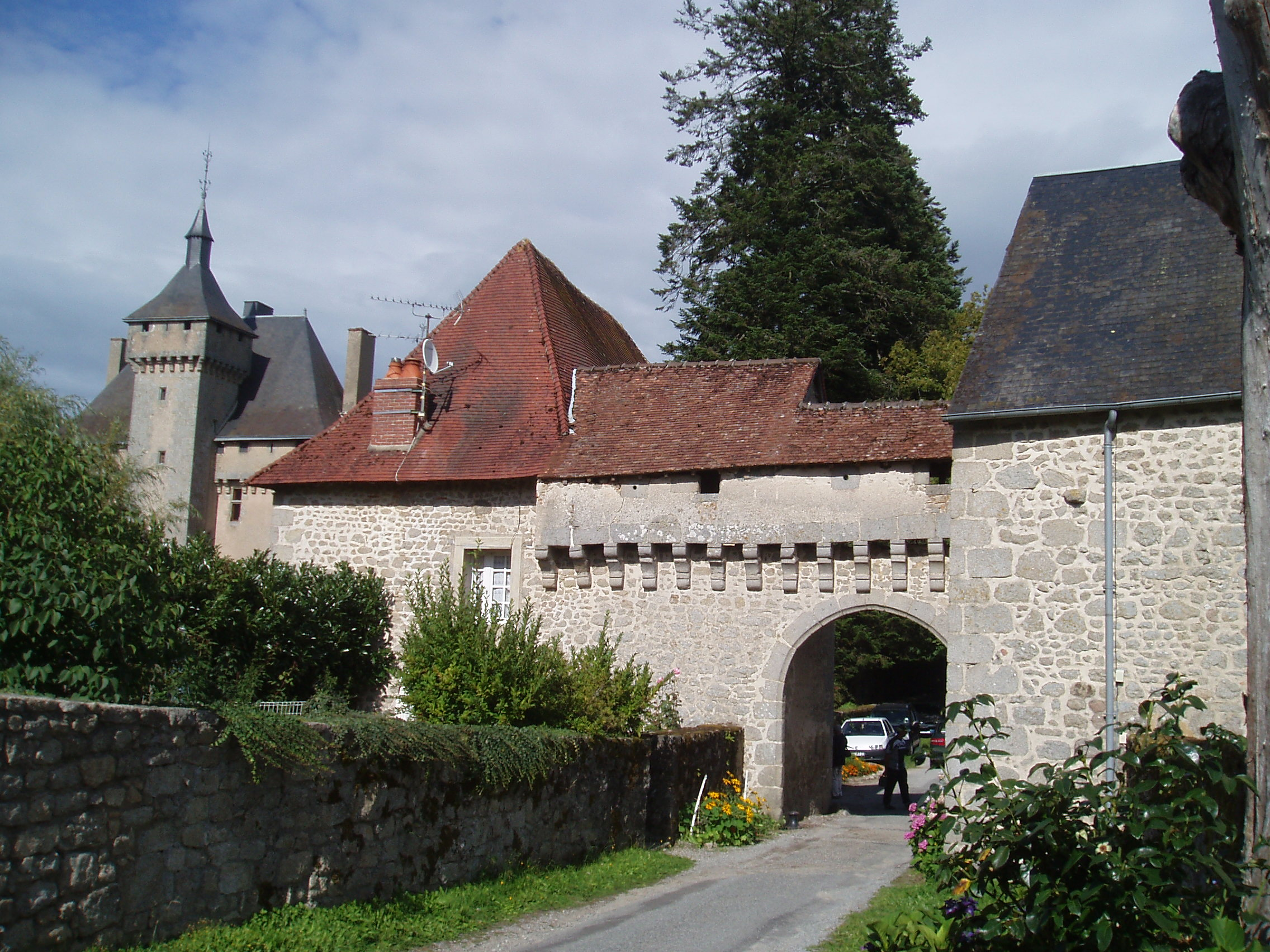 Château médiéval